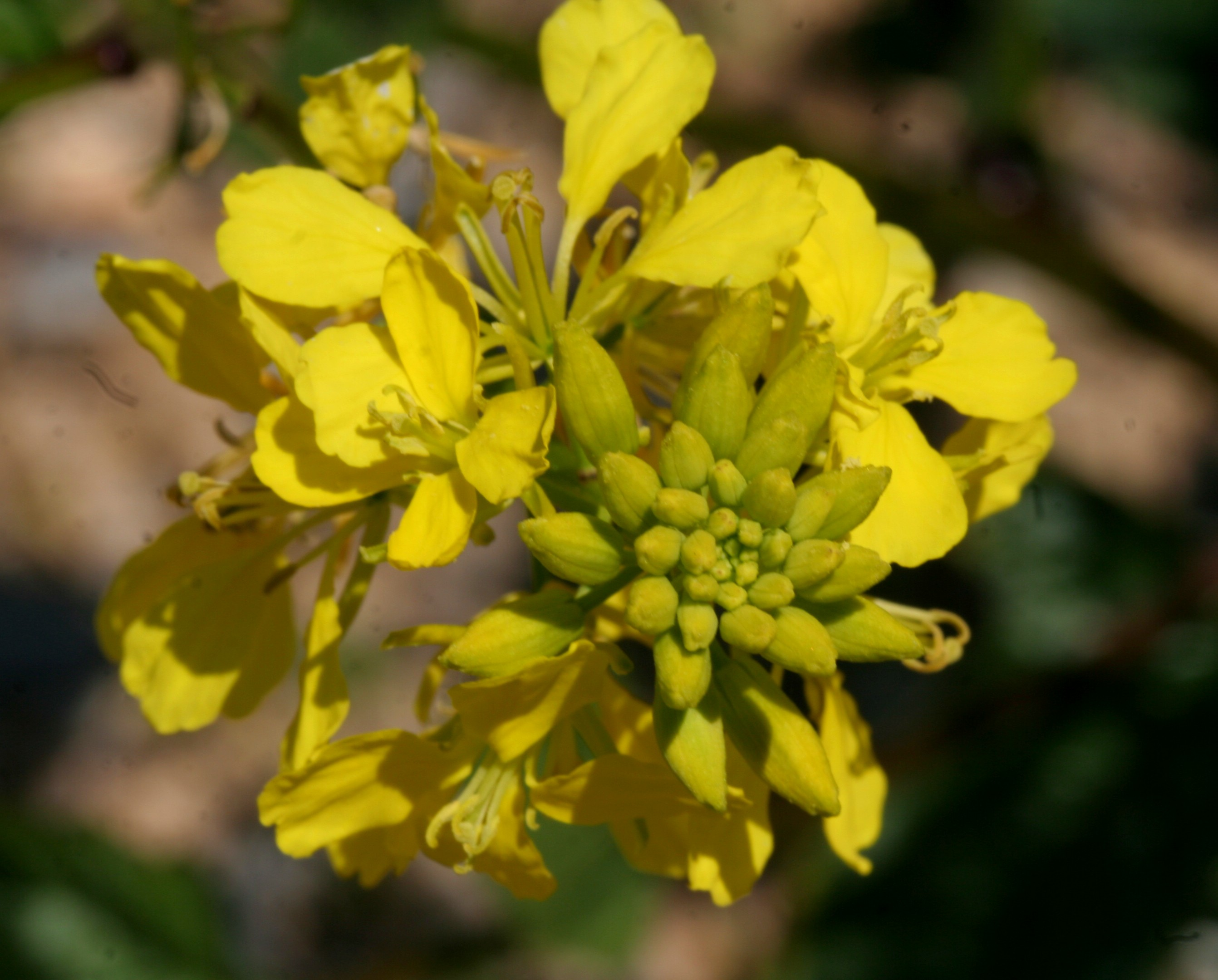 Erba di Santa barbara comune - Località : Pasa, Sedico (BL), 356 m s.l.m.